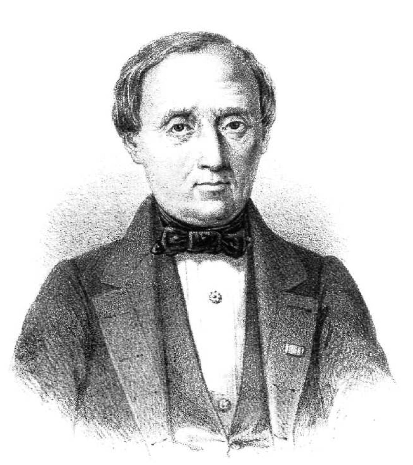 Griechischer Freiheitskämpfer, 19. Jahrhundert